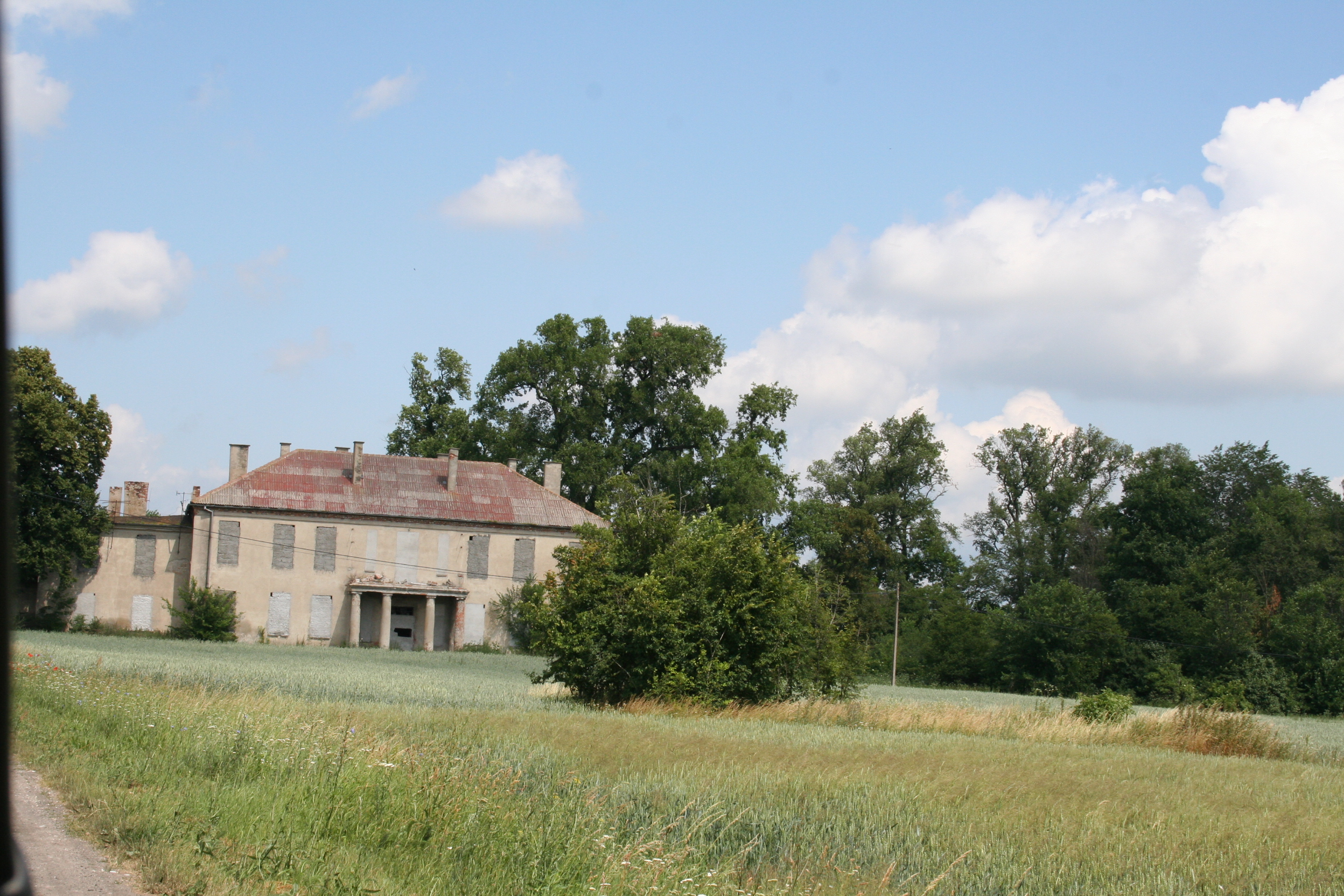 Czyste - zespół dworski, poł. XIX w.: dwór, pocz. XIX w.; park